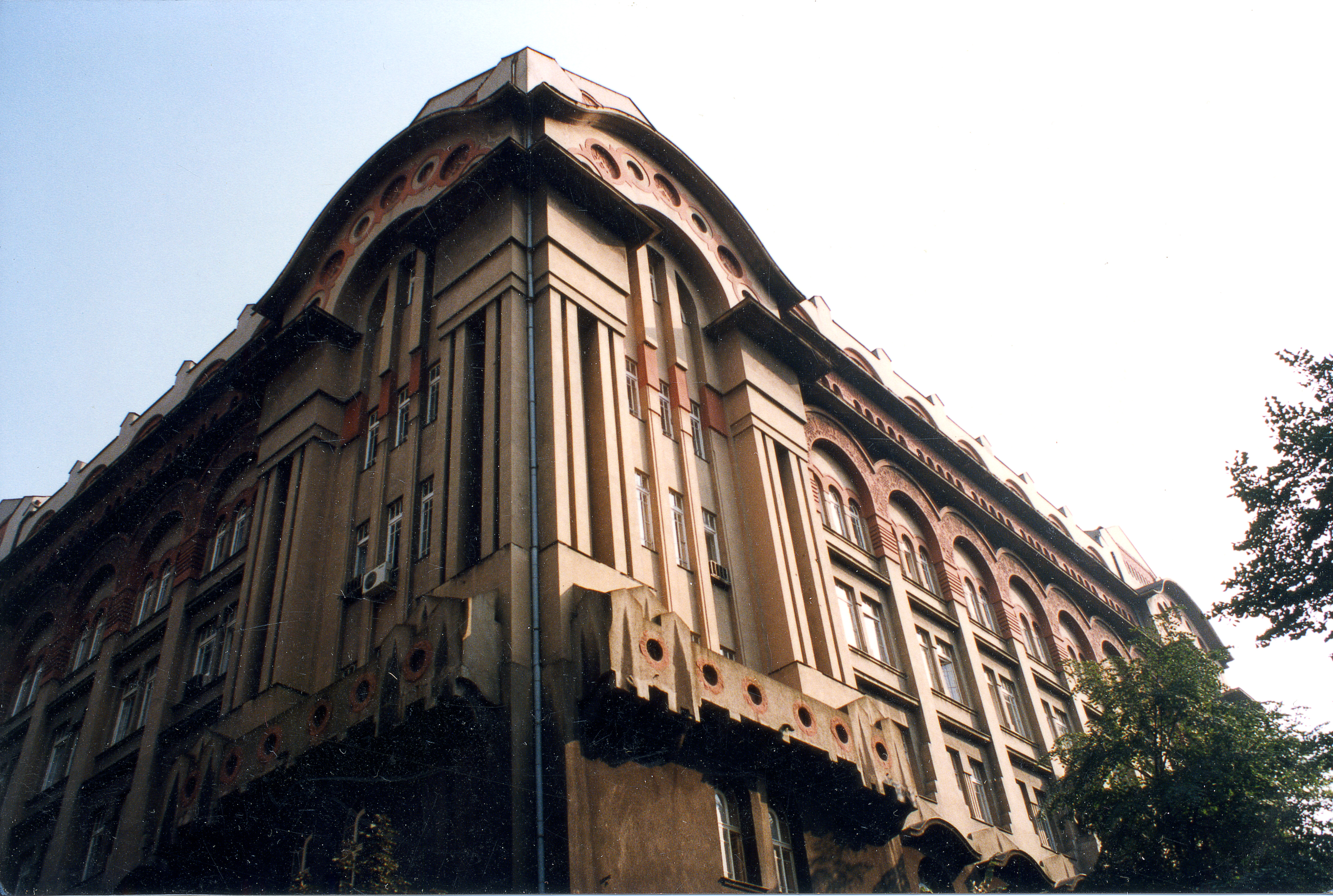 Снимак из 1995.